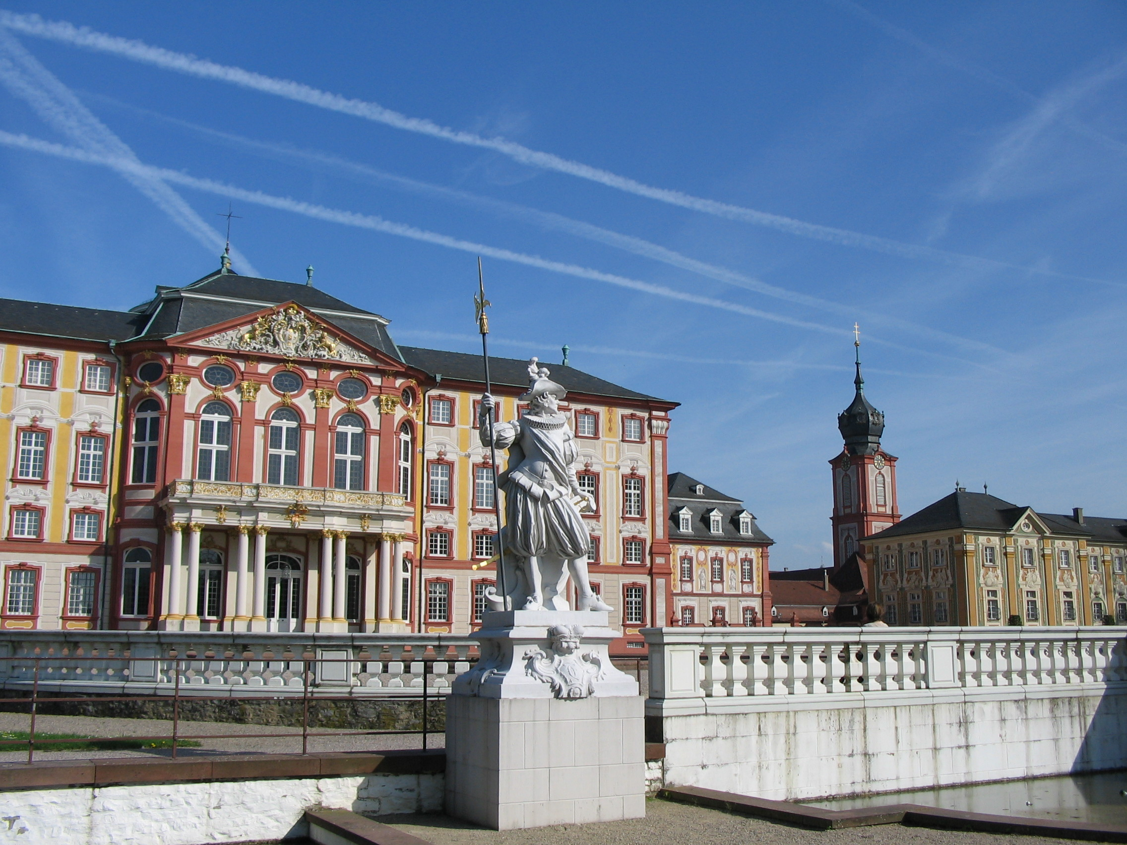 Schloss Bruchsal Gartenfront, im Vordergrund Hellebardiere von Joachim Günther